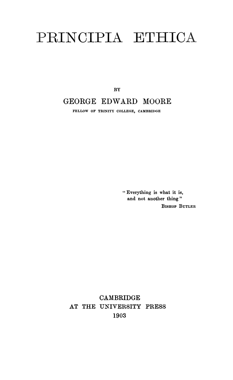 Scan de la page de titre du Principia Ethica de G. E. Moore (1903)